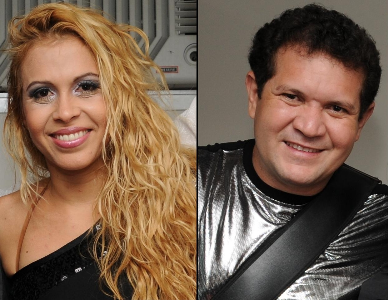 Banda Calypso em 2009.